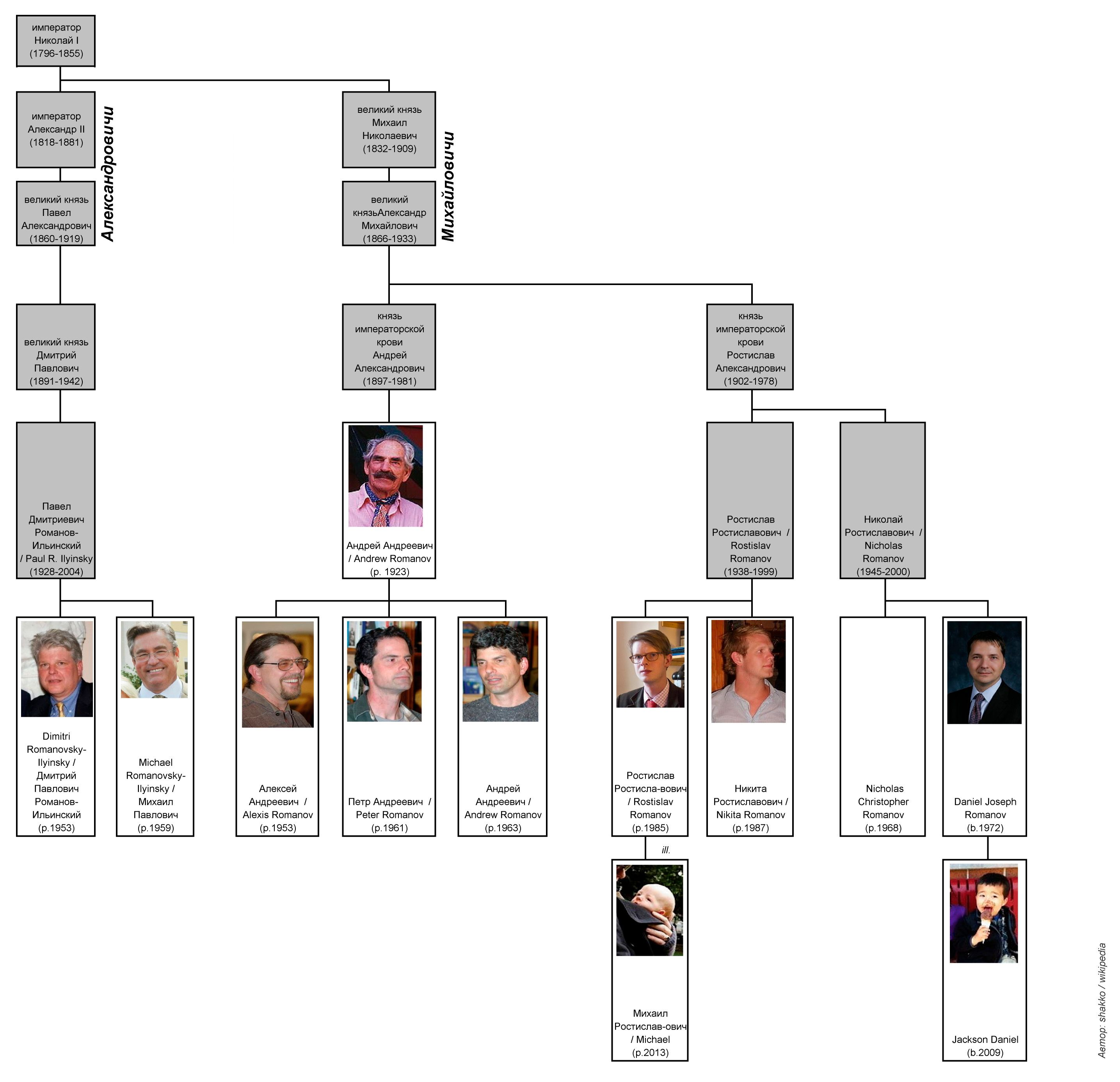 Генеалогическое древо дома Романовых. Мужские представители Романовых и их сыновья (на 2013 год)